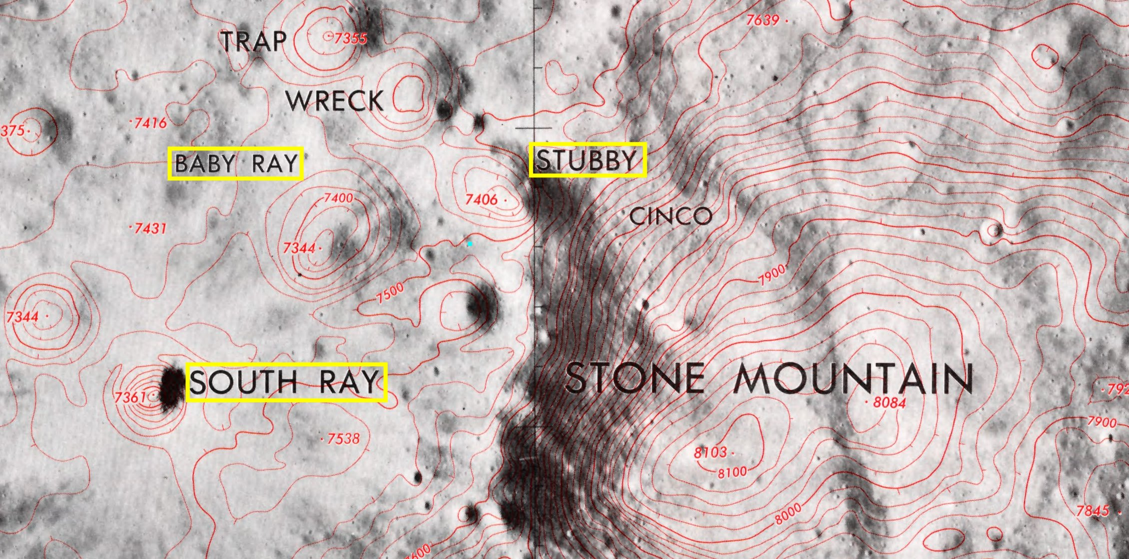 Lugar de aterrizaje del Apolo 16. (Lunar Topophotomap 78D2S1(50) Apollo 16 Landing Area)